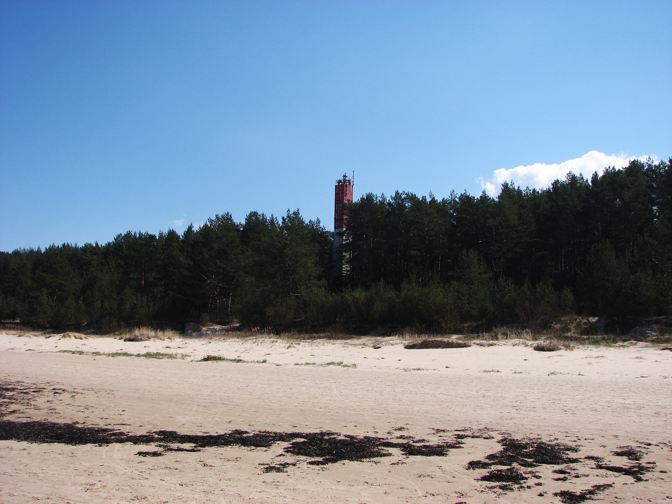 Bulluciems lighted bank mark, Jurmala, Latvia. Светящий знак Буллюциемс, Юрмала, Латвия.